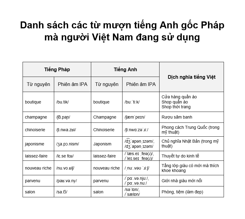 Danh sách các từ mượn tiếng Anh gốc Pháp mà người Việt Nam đang sử dụng.